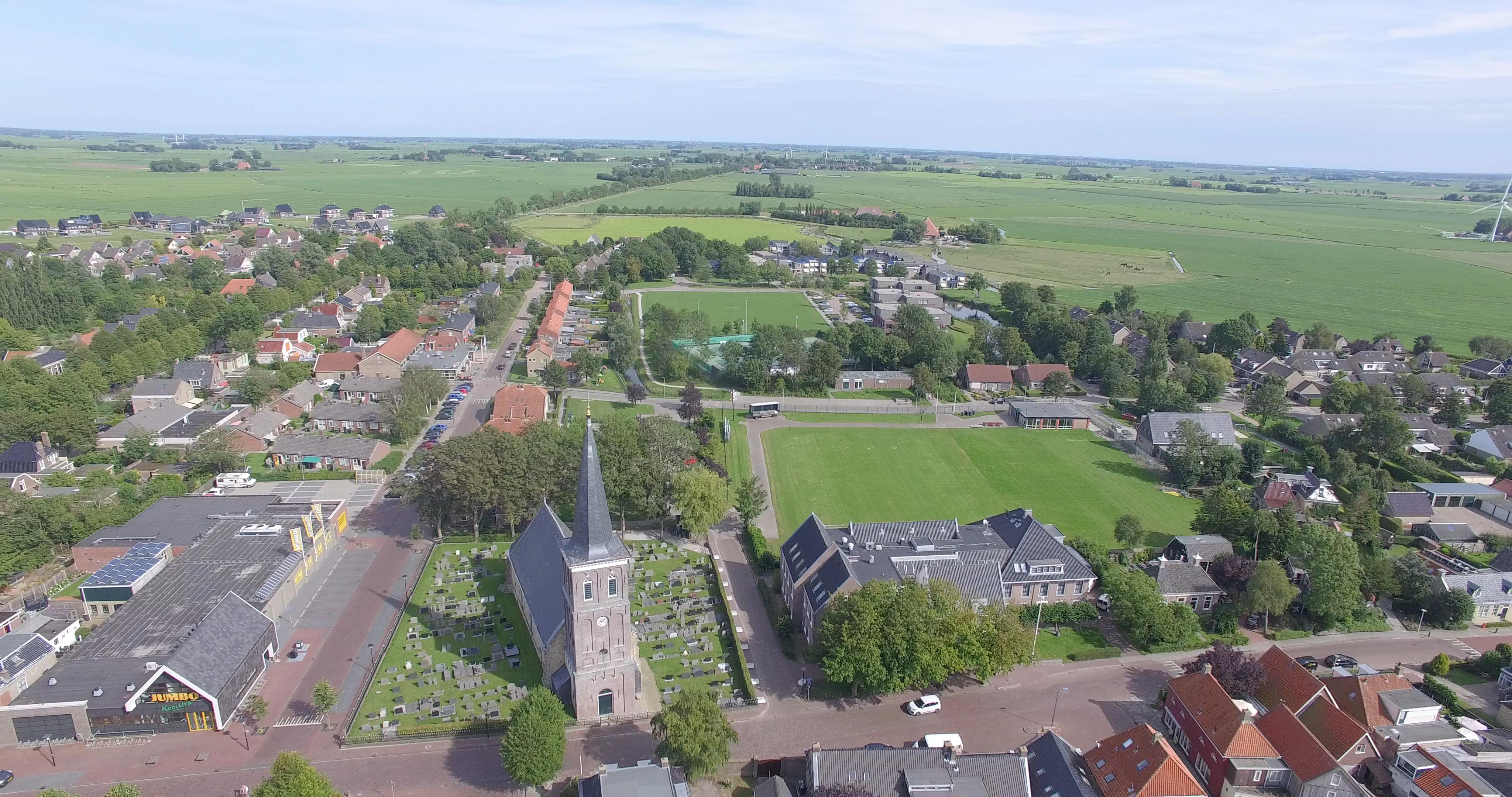 Wommels